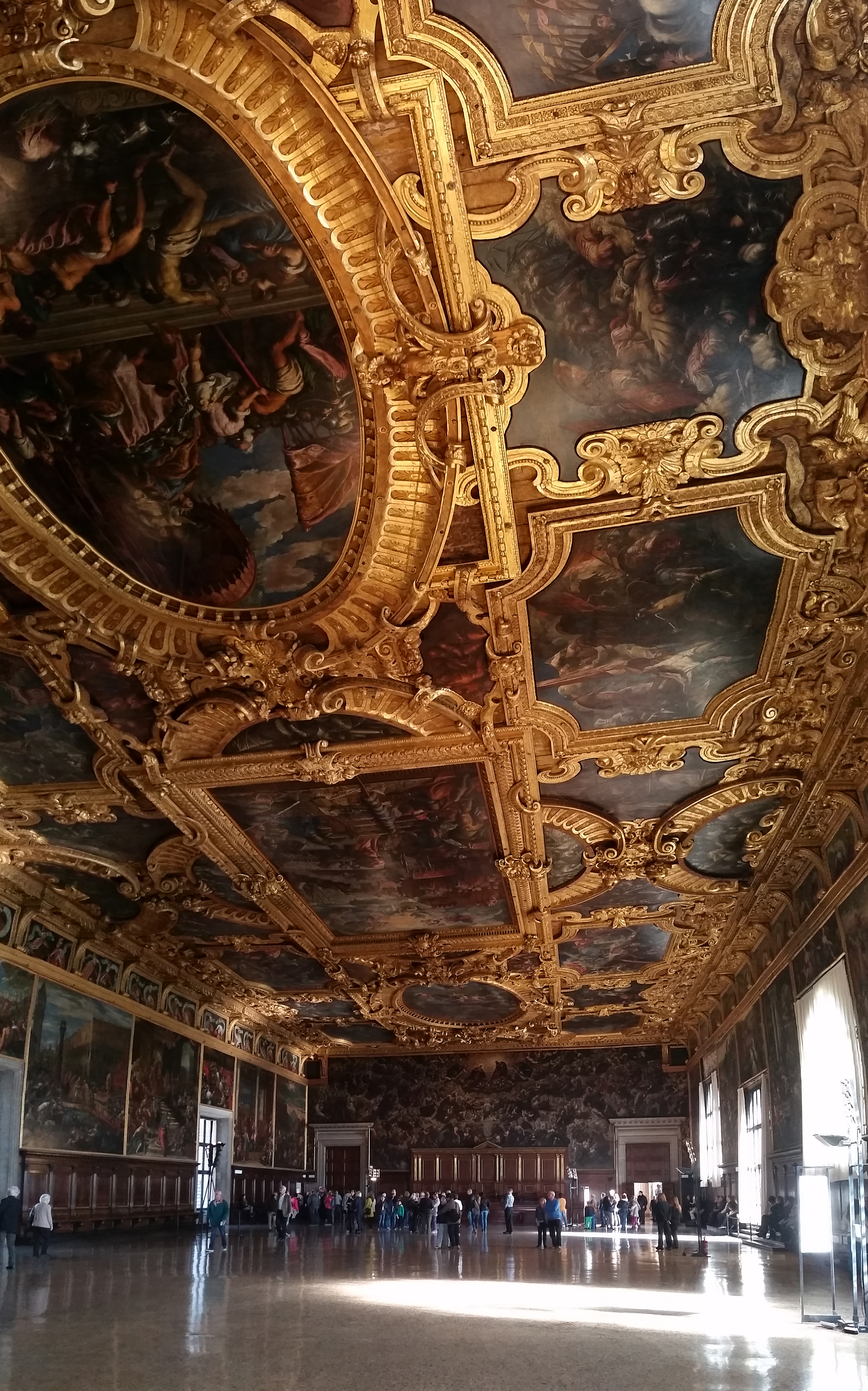 Dogenpalast Großer Saal